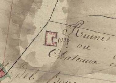 El Castell d'Ultrera, d'Argelers, en el Cadastre napoleònic del 1812 (Arxius Departamentals dels Pirineus Orientals)